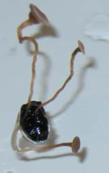 Apotecioj ĝermantaj sur skleroto